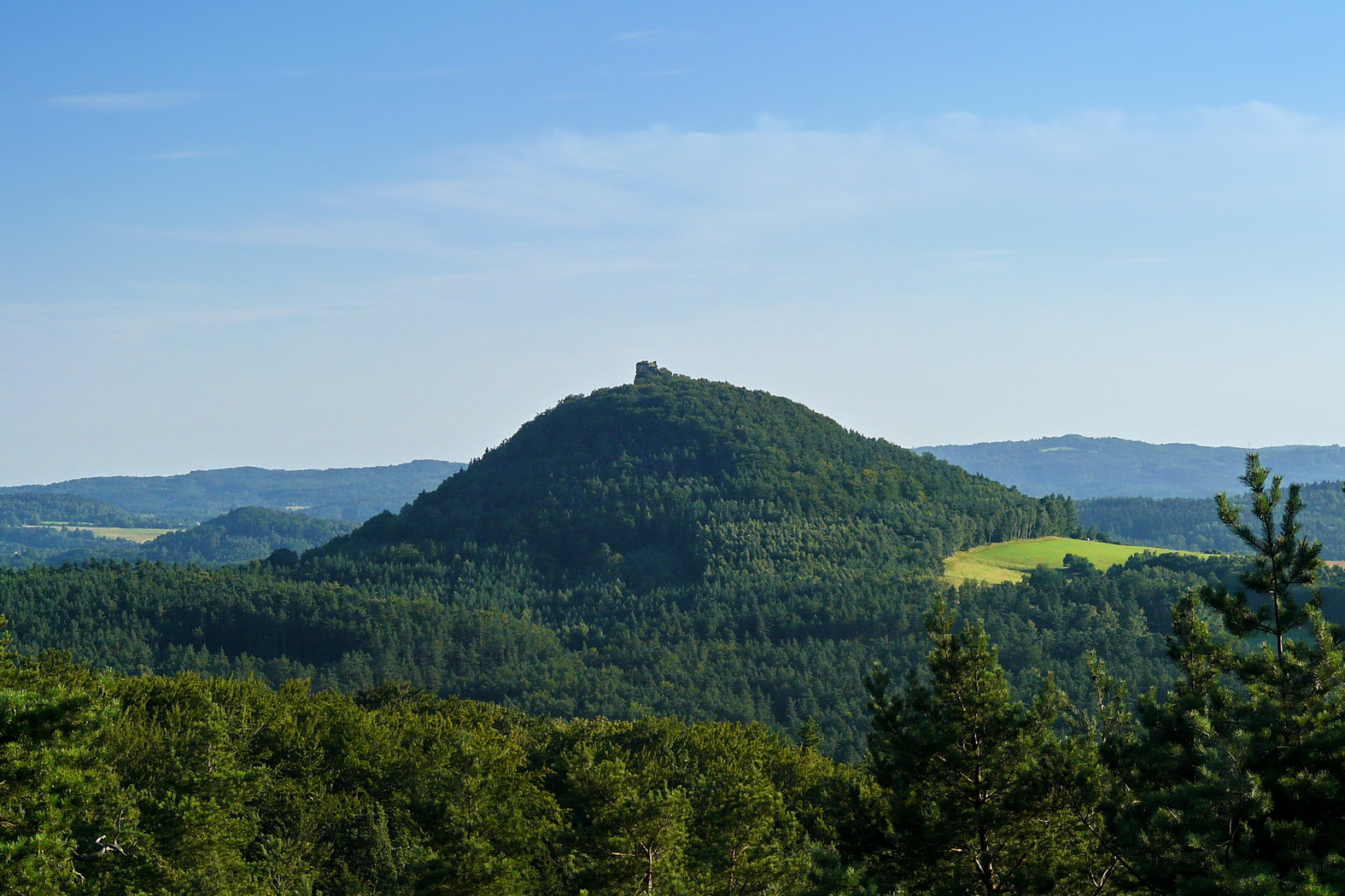 Berkovský vrch z Šediny